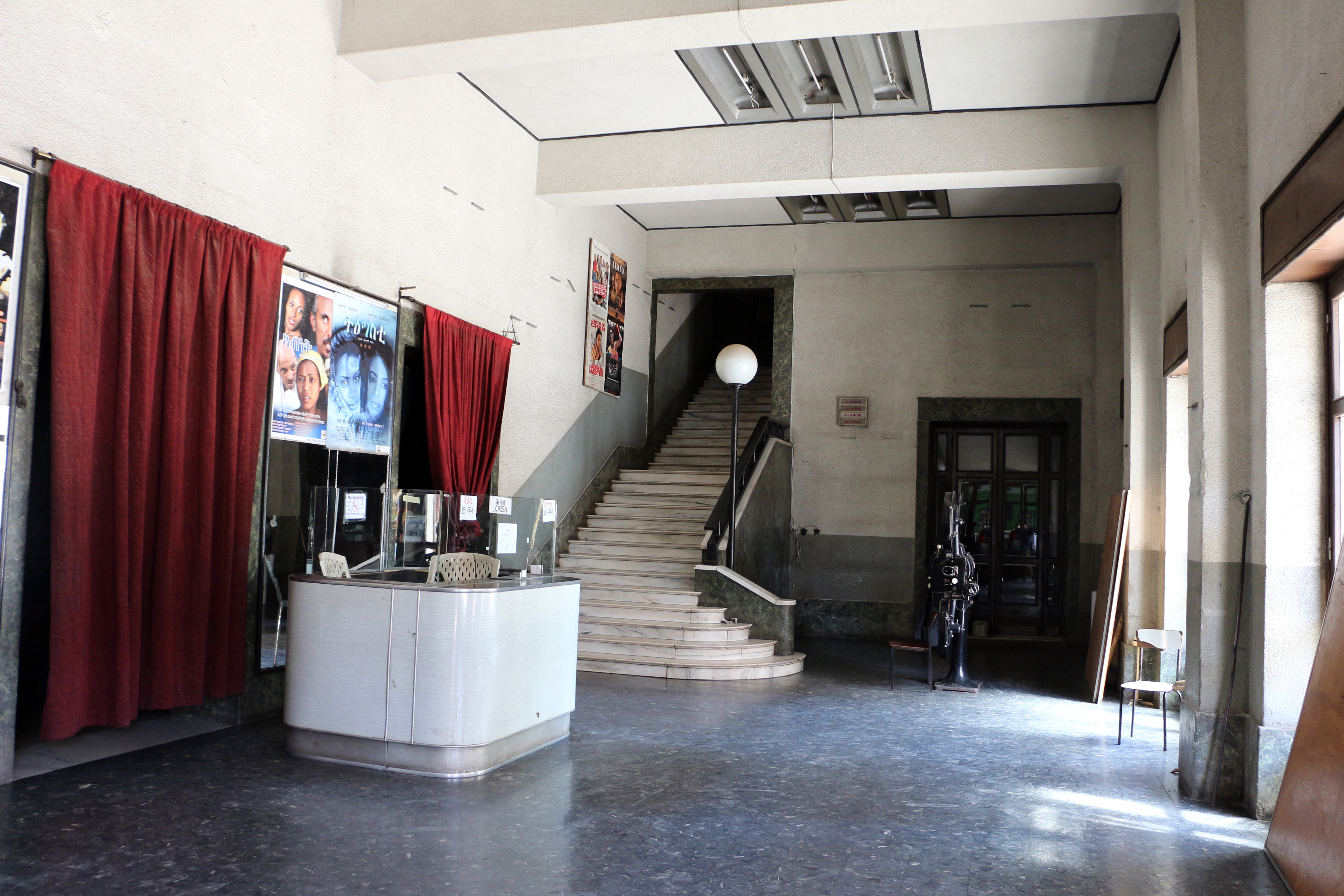 Asmara, cinema impero, interno 01.JPG